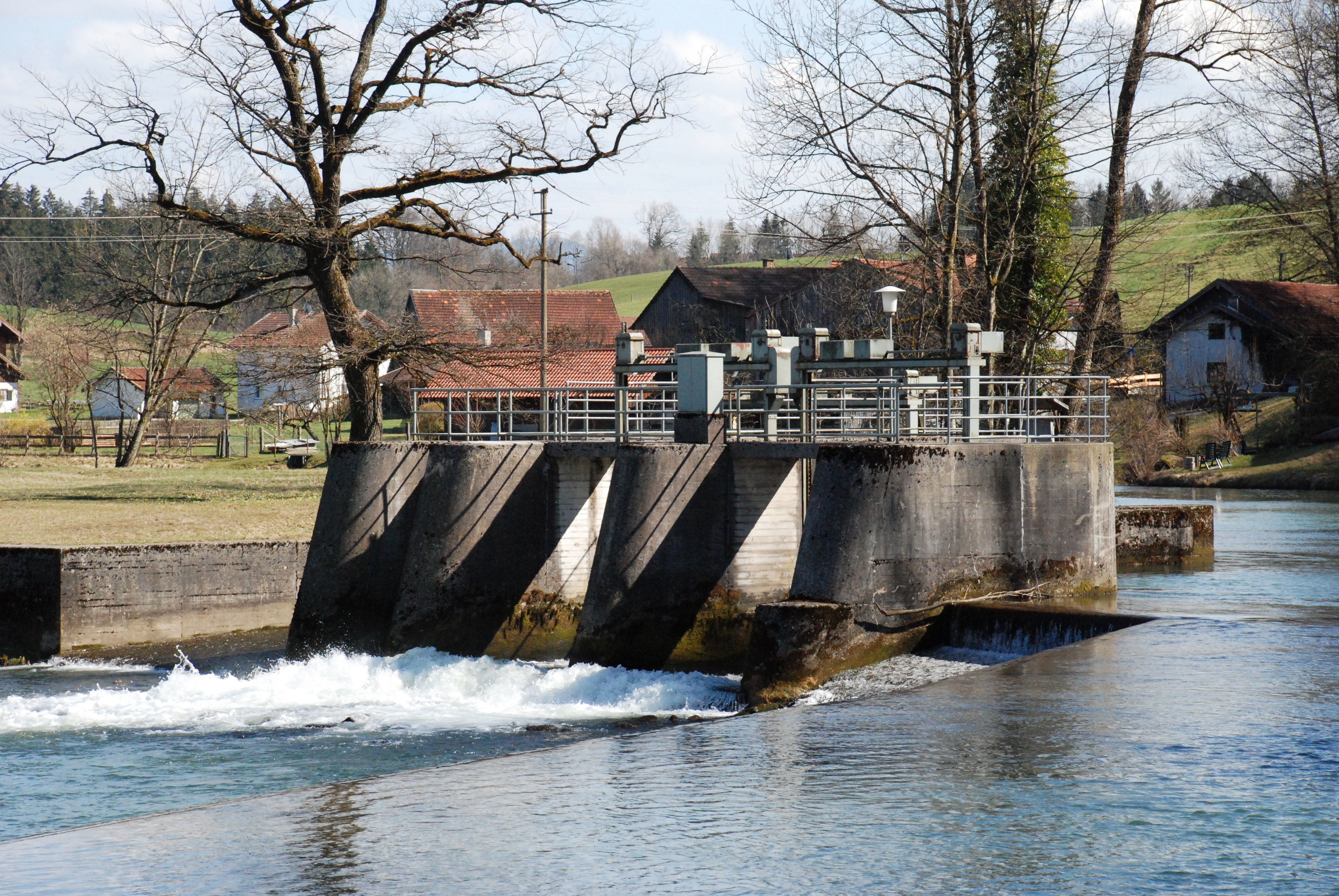 Wehr an der Loisach in Beuerberg, Gemeinde Eurasburg, Landkreis Bad Tölz-Wolfratshausen, Regierungsbezirk Oberbayern, Bayern.